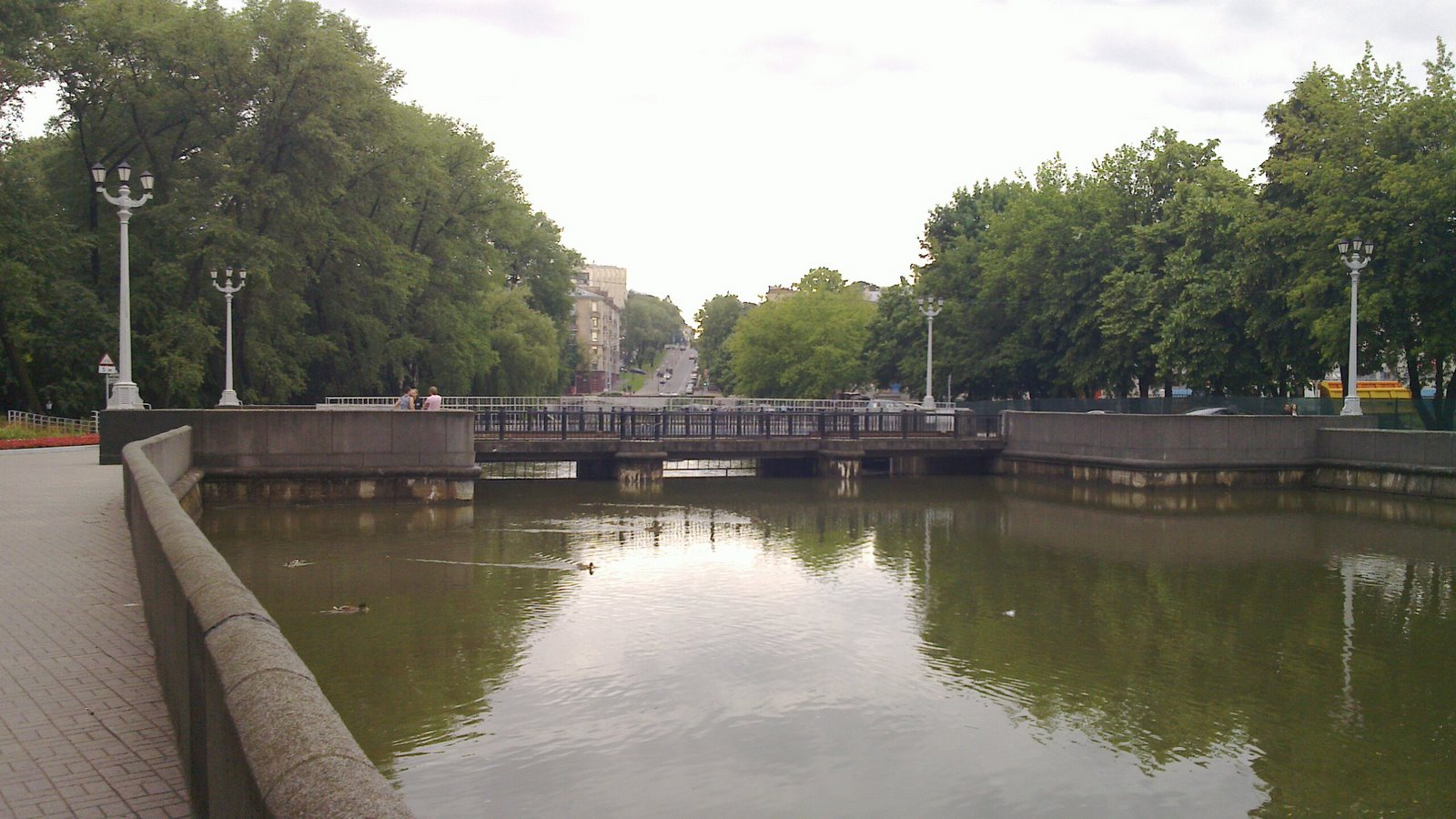 Памятник Захарию Корнееву, Minsk, Belarus